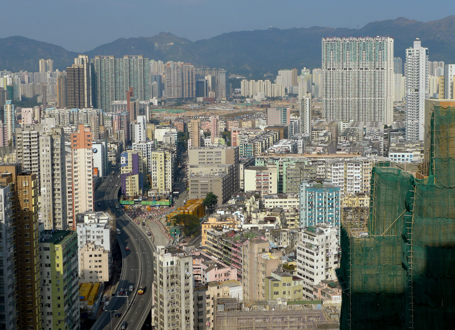 To Ka Wan